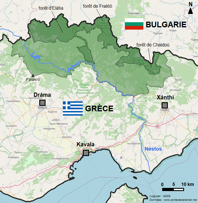 Emprise du parc national de la chaîne des Rhodopes avec la zone cœur en vert foncé et la zone périphérique en vert plus clair. Les villes environnantes, le fleuve Nestos, le mont Falakró et les principales forêts sont légendés sur la carte. UNEP-WCMC and IUCN (2020), Protected Planet: Ethniko Parko Oroseiras Rodopis in Greece/Ethniko Parko Oroseiras Rodopis, Perifereiaki Ektasi in Greece ; The World Database on Protected Areas (WDPA)/The Global Database on Protected Areas Management Effectiveness (GD-PAME) [On-line], Cambridge, UK. Data provided by the European Environment Agency (EEA). Available at: Basemap: OpenStreetMap. Free software: QGIS. Creation: Iolchos07.